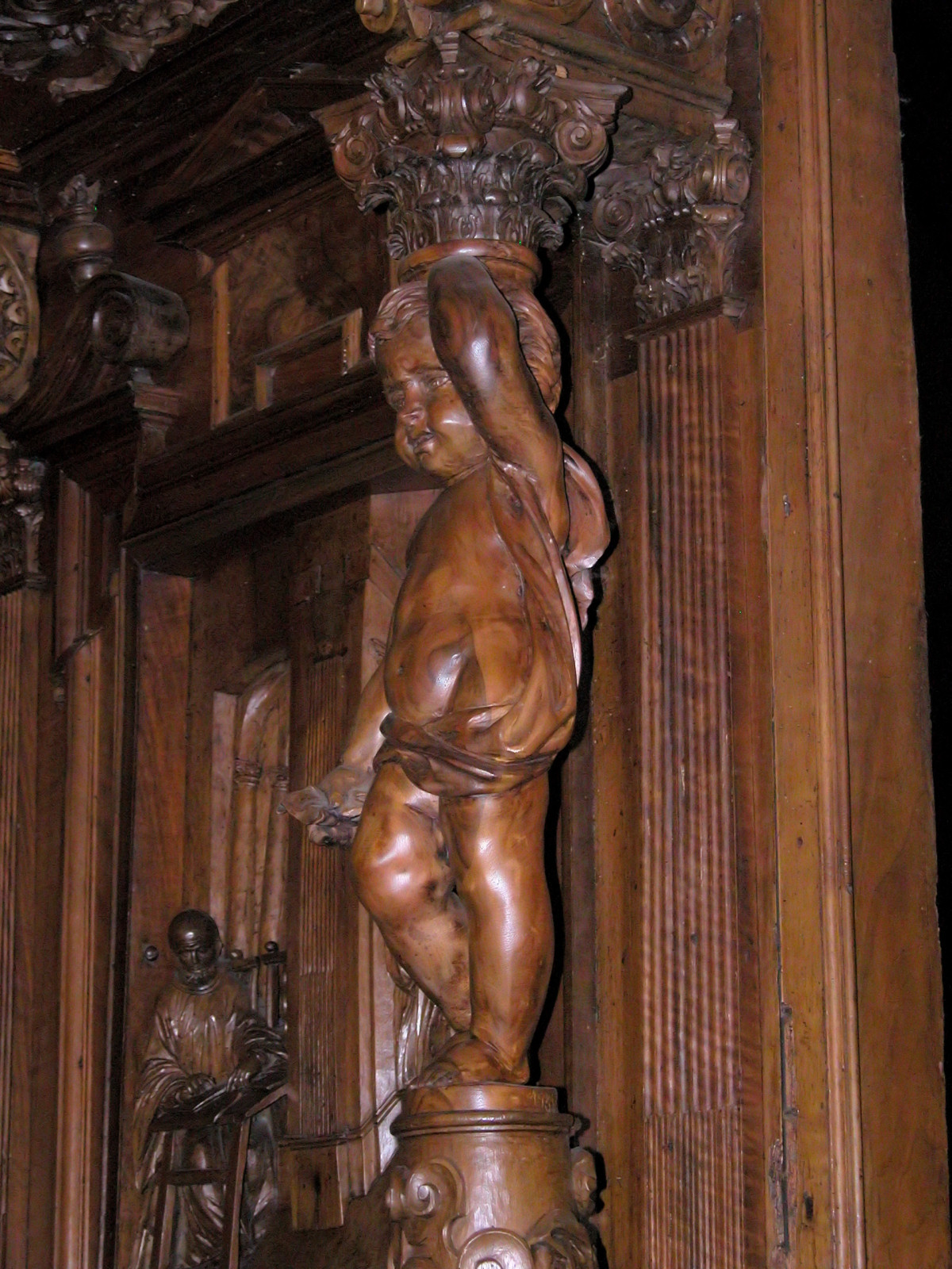 Putto. Dettaglio del Coro Ligneo dell'Abbazia di Chiaravalle a Milano. Foto da me realizzata.